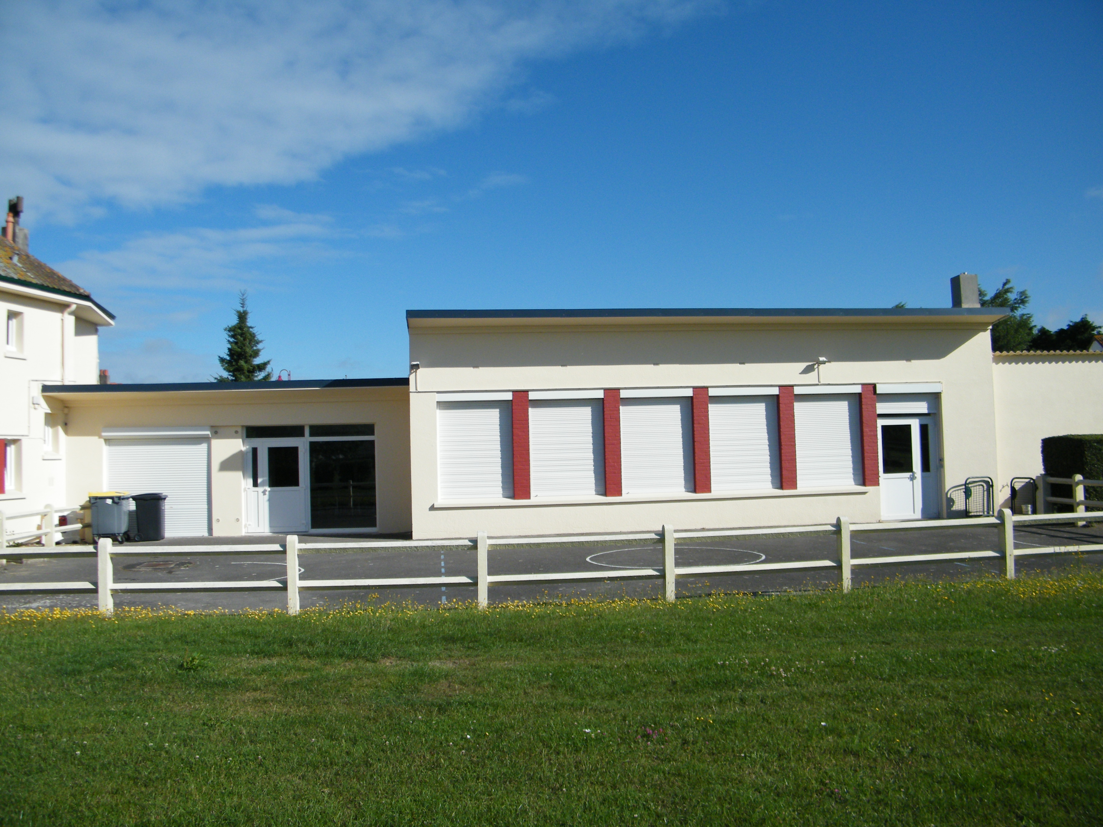 École, Waben, Pas-de-Calais, France